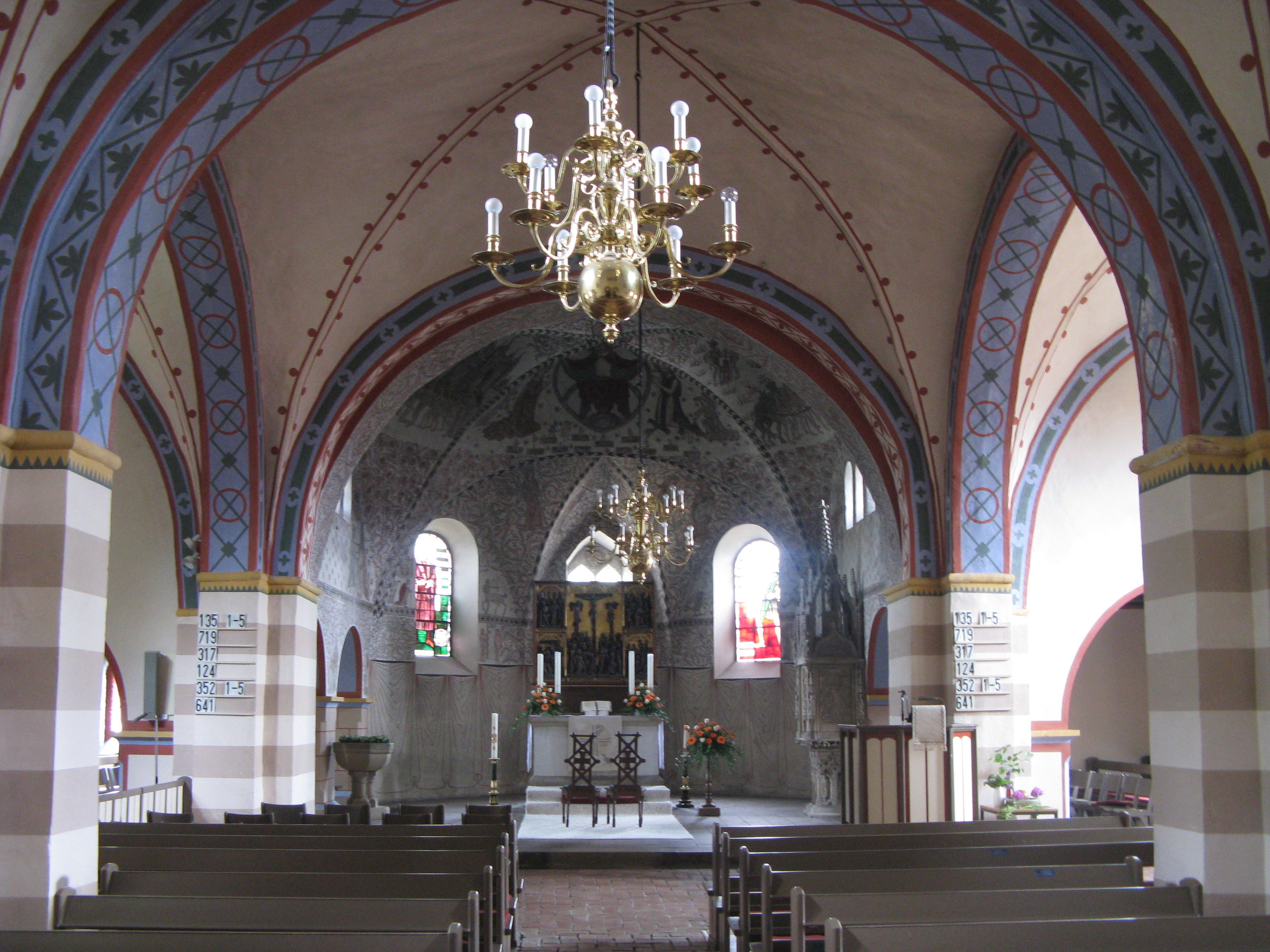 Wnętrze kościoła pw św Klemensa w Marklohe